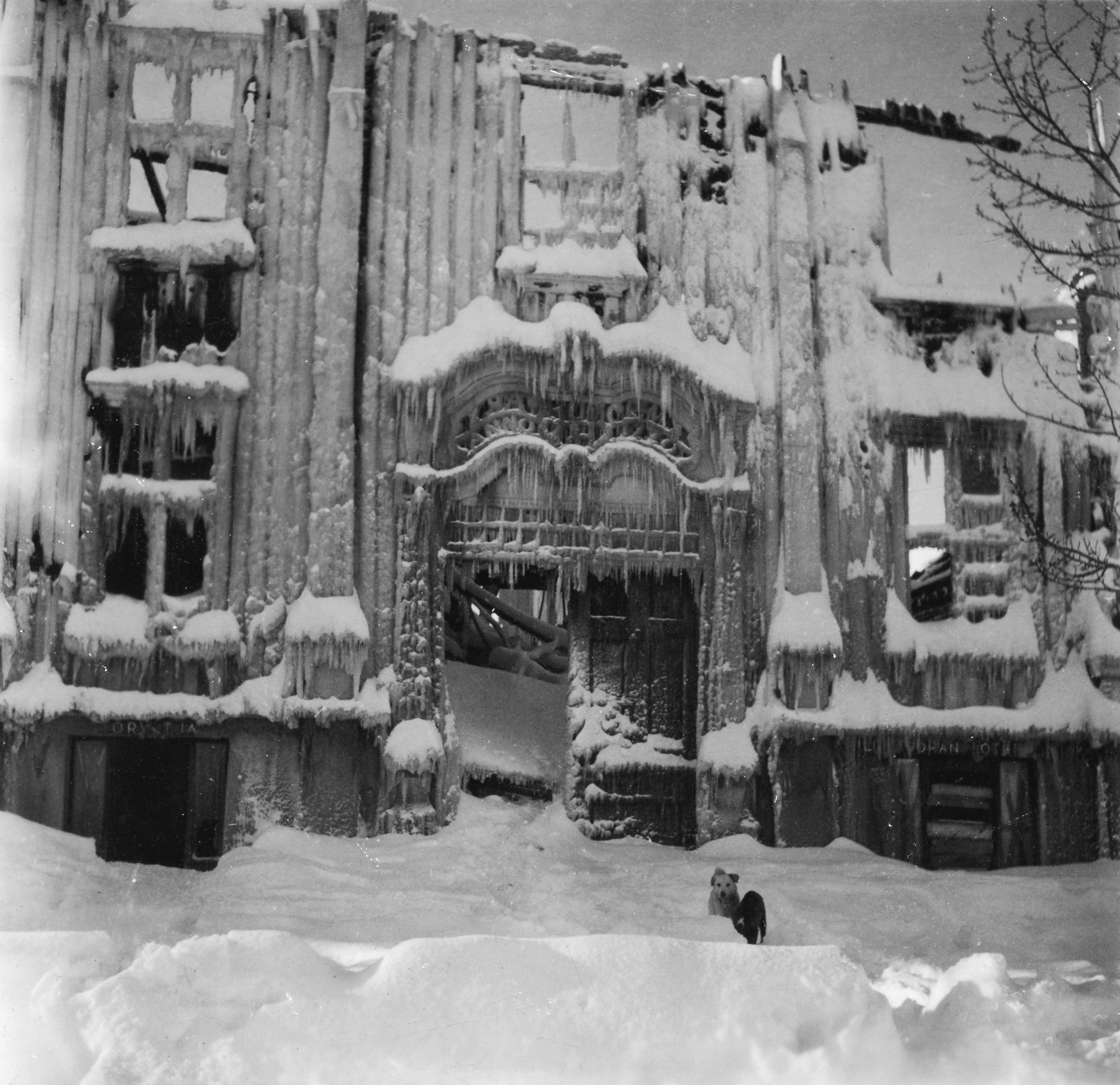 Format: Svart-hvitt fotopositiv Dato / Date: 27 Januar 1942 Fotograf / Photographer: Fridolin Zint (1907 - 1985) Sted / Place: Torvet, Trondheim Eier / Owner Institution: Trondheim byarkiv, The Municipal Archives of Trondheim Arkivreferanse / Archive reference: Tor.H49.B07.FZ072 Merknad: Bilder donert til Trondheim byarkiv av Joachim Zint, sønn av ingeniør Fridolin Zint (1907 - 1985). Fridolin Zint tjenestegjorde i Trondheim 1942 som Gefreiter ved Festungs-Pionier-Kommando XVI (Feldpostnummer 42399). I perioden 21.01.1942 - 31.07.1942 var han innkvartert i Trondhjems borgerlige Realskole. Billedsamlingen viser bl.a. reisen fra militærleiren i Zerbst i Tyskland til Trondheim via Danmark og Kattegat, brannen i Harmonien 27.01.1942 og avreisen fra Norge via Oslo og tilbake til Tyskland sommeren 1942. Flere av bildene er fargefotografier. I etterkant av tjenestetiden i Trondheim ble Fridolin Zint teknisk inspektør i Wehrmacht og steg i gradene inntil han ved krigens slutt var oberleutnant.